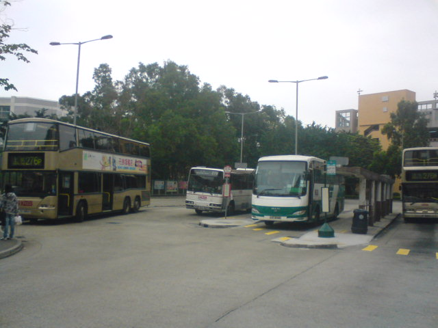 天慈巴士總站(4/4/2010)